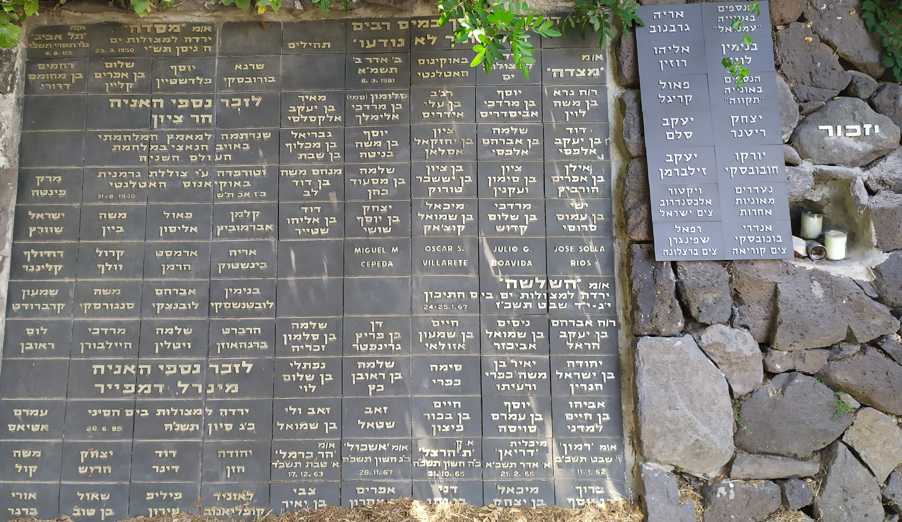 יד לימאי צי הסוחר שאבדו ביםומקום קבורתם לא נודע